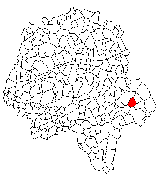 Carte de situation de la commune de Chemillé-sur-Indrois sur le département d'Indre et Loire